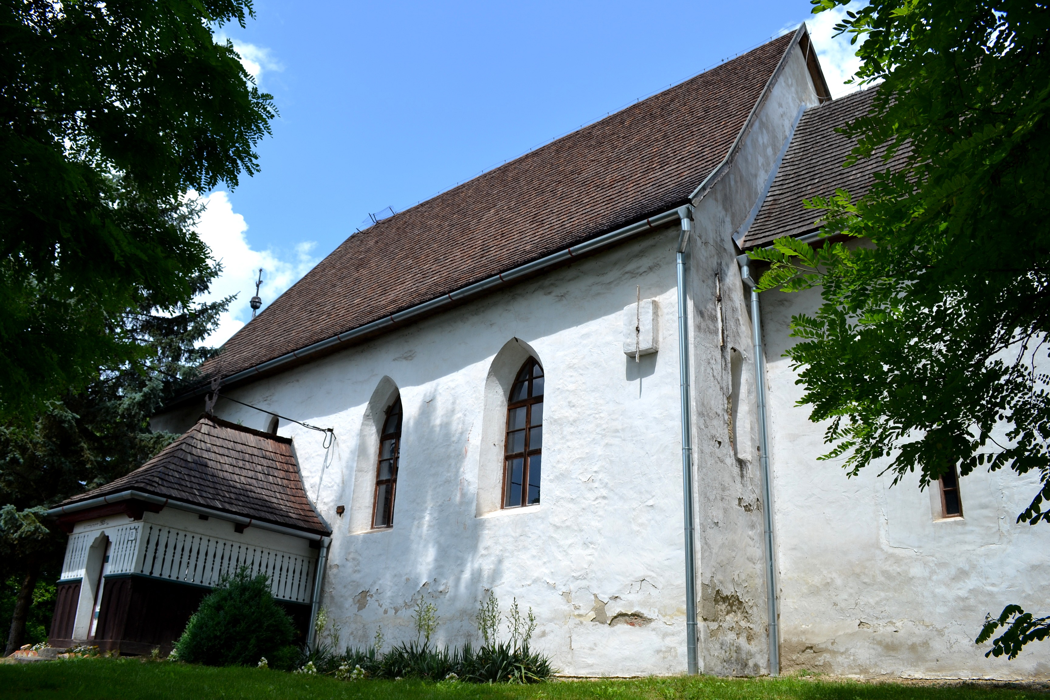 Žíp (okr. Rimavská Sobota), kostol Reformovanej kresťanskej cirkvi; celkový pohľad